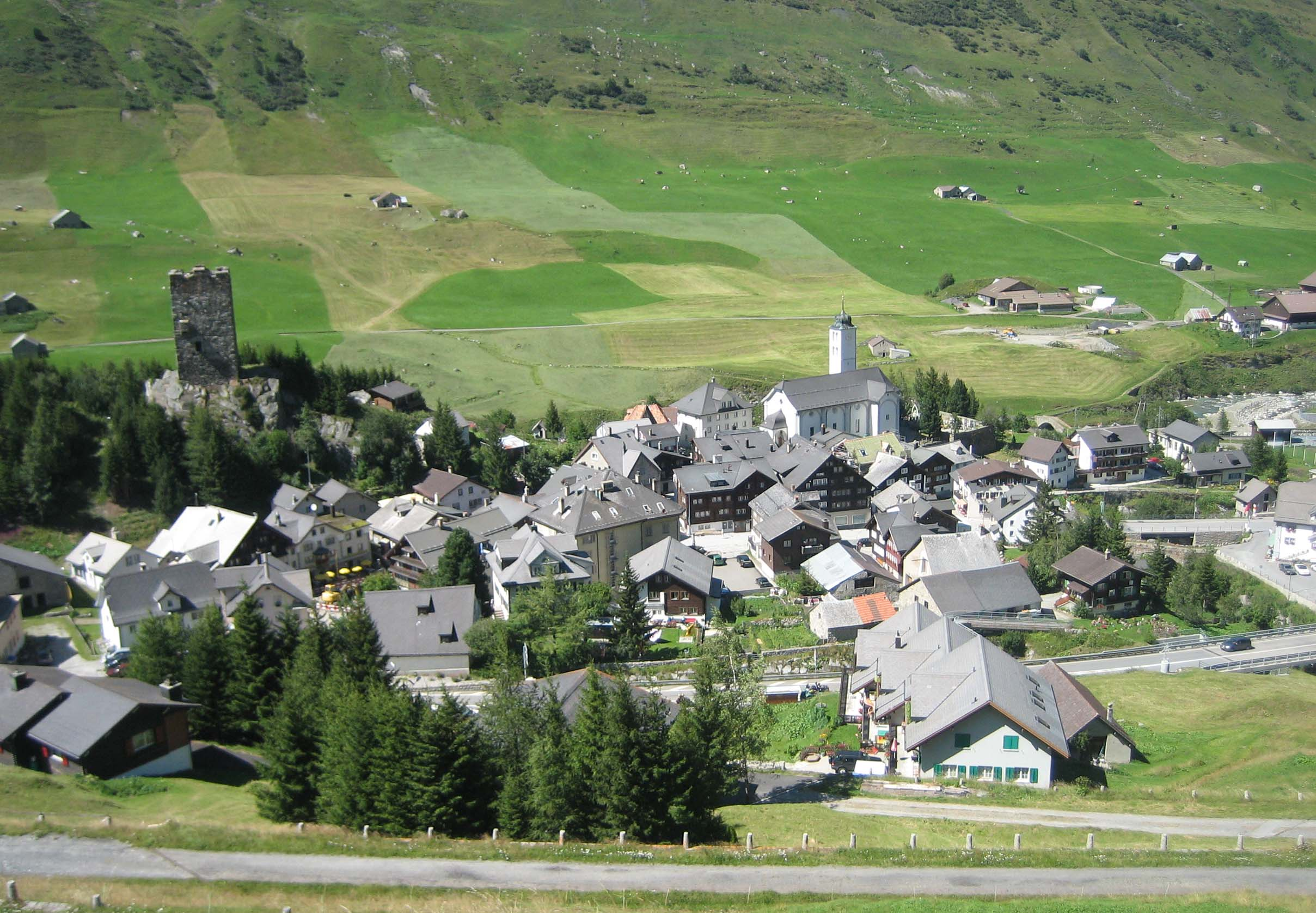 Hospental